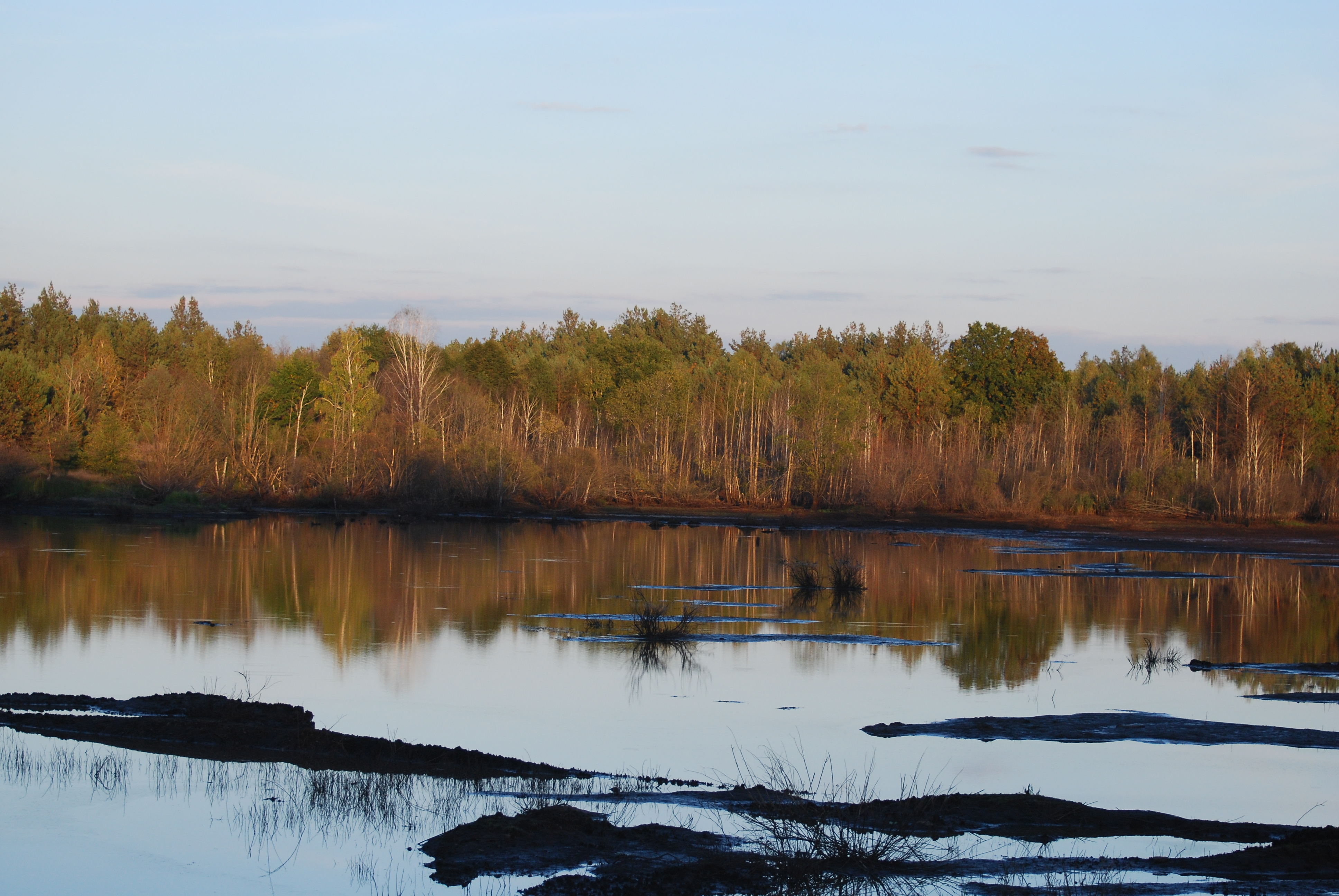 Урочище «Брище», Березнівський район Князівське лісництво: кв. 16 вид. 6-49